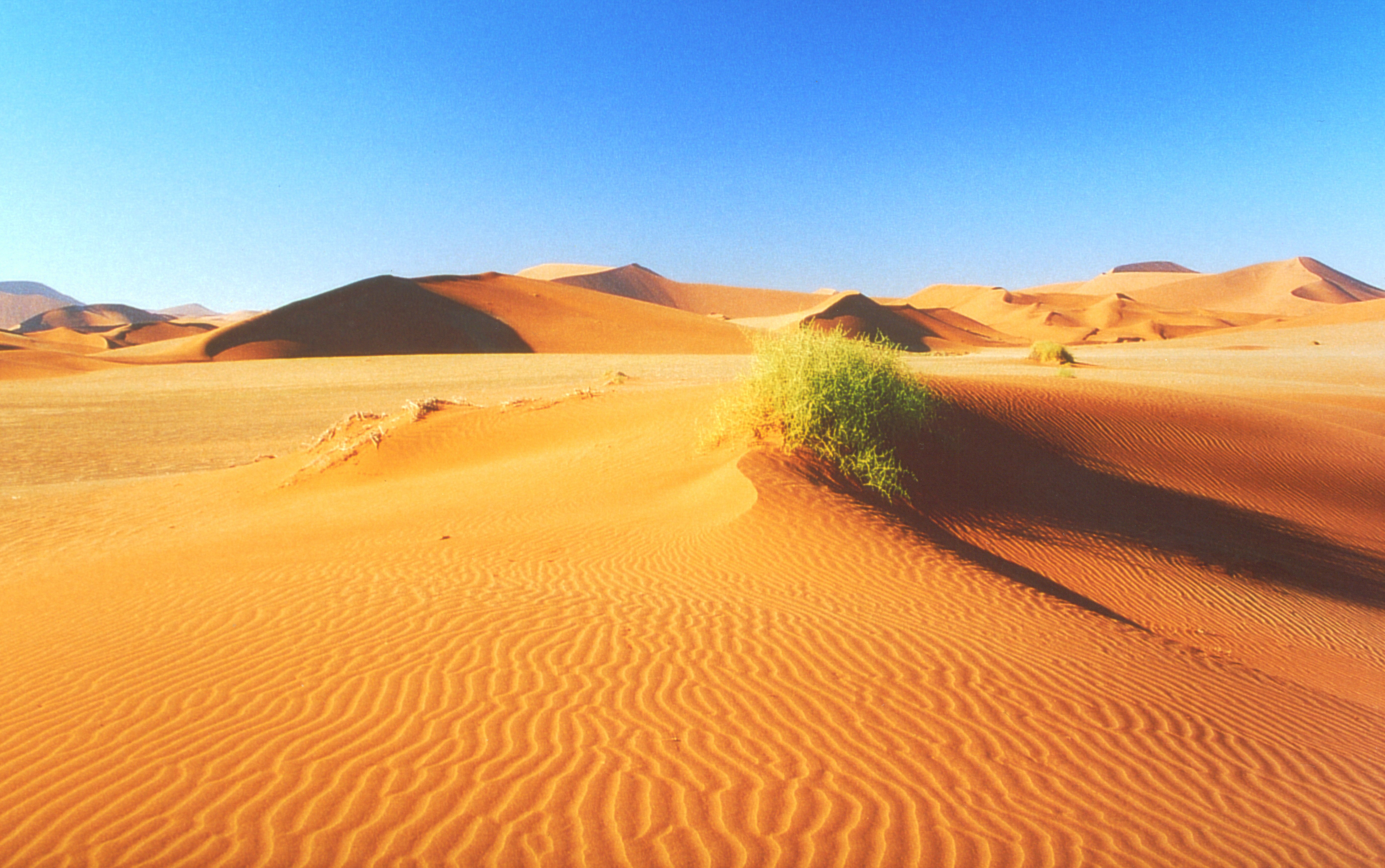 Namibwüste (Namibia)